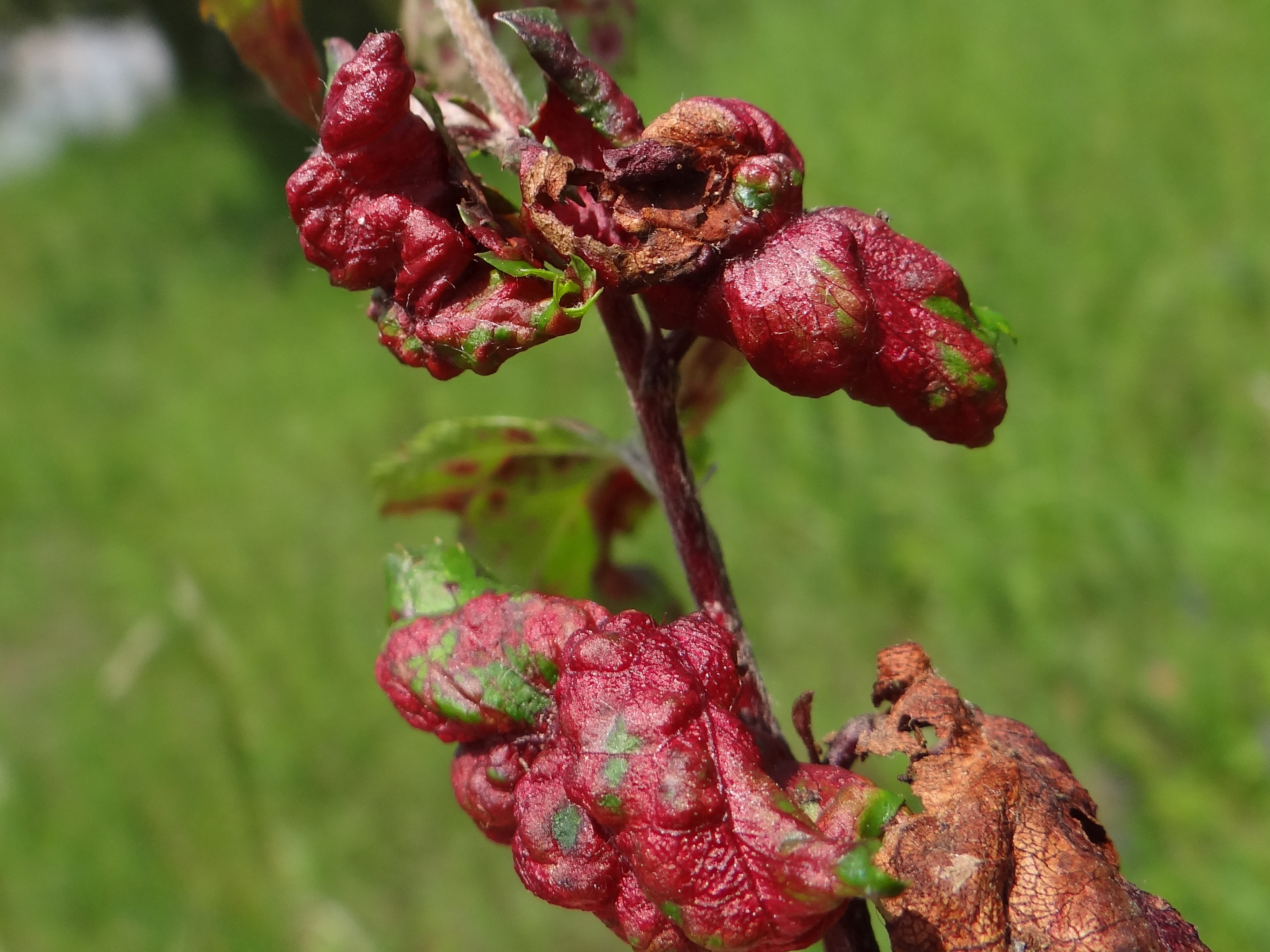 Taphrina crataegi. Location: Poland, Szklary, woj. małopolskie